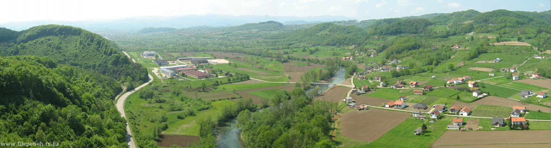 Панорама Жарковине, фотографисано са Шкребиног Камена